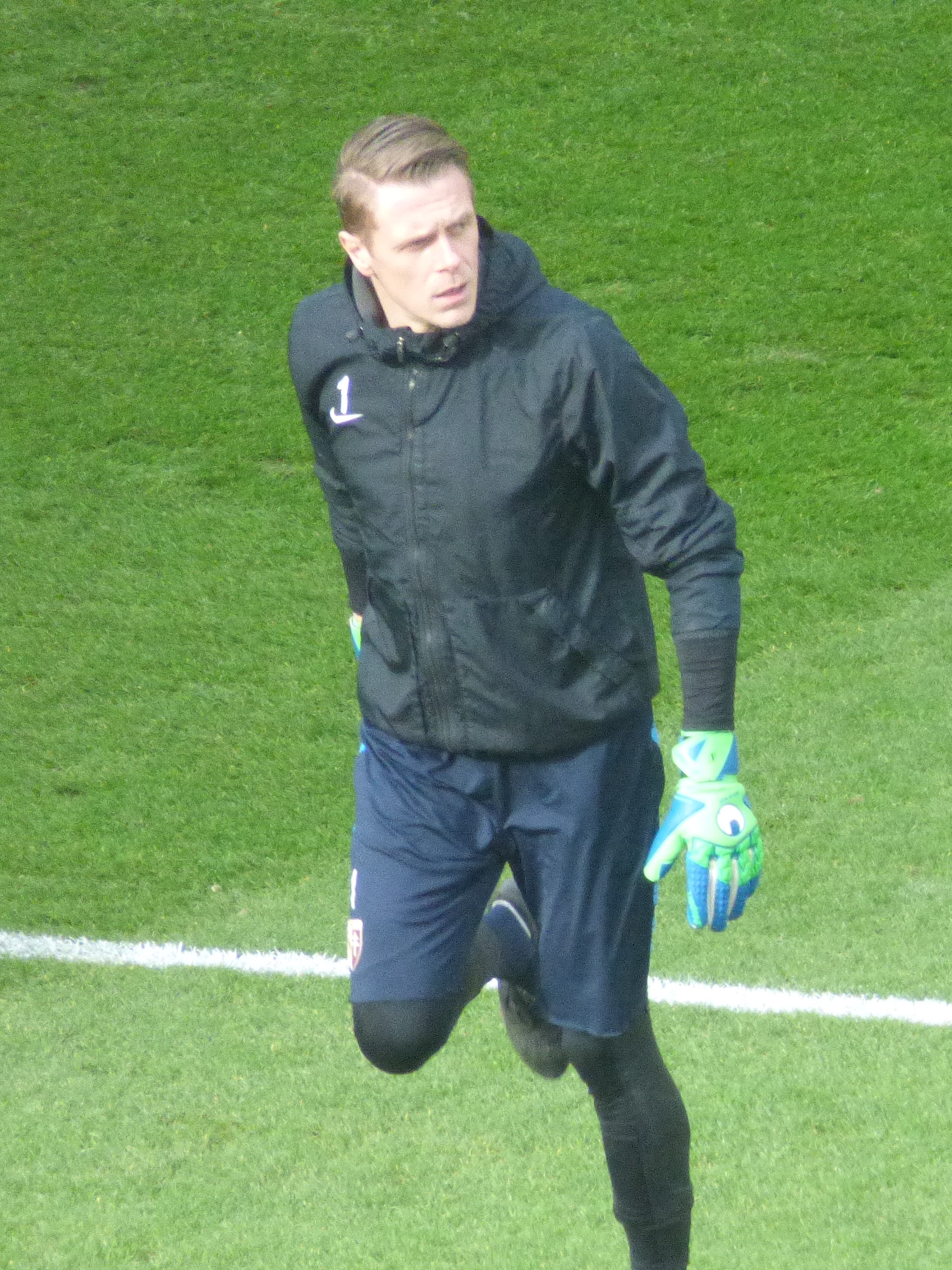 Paul Delecroix avant le match RC Lens / FC Metz, comptant pour la vingt-quatrième journée du championnat de France de Ligue 2 2018-2019, le 9 février 2019, au Stade Bollaert-Delelis.